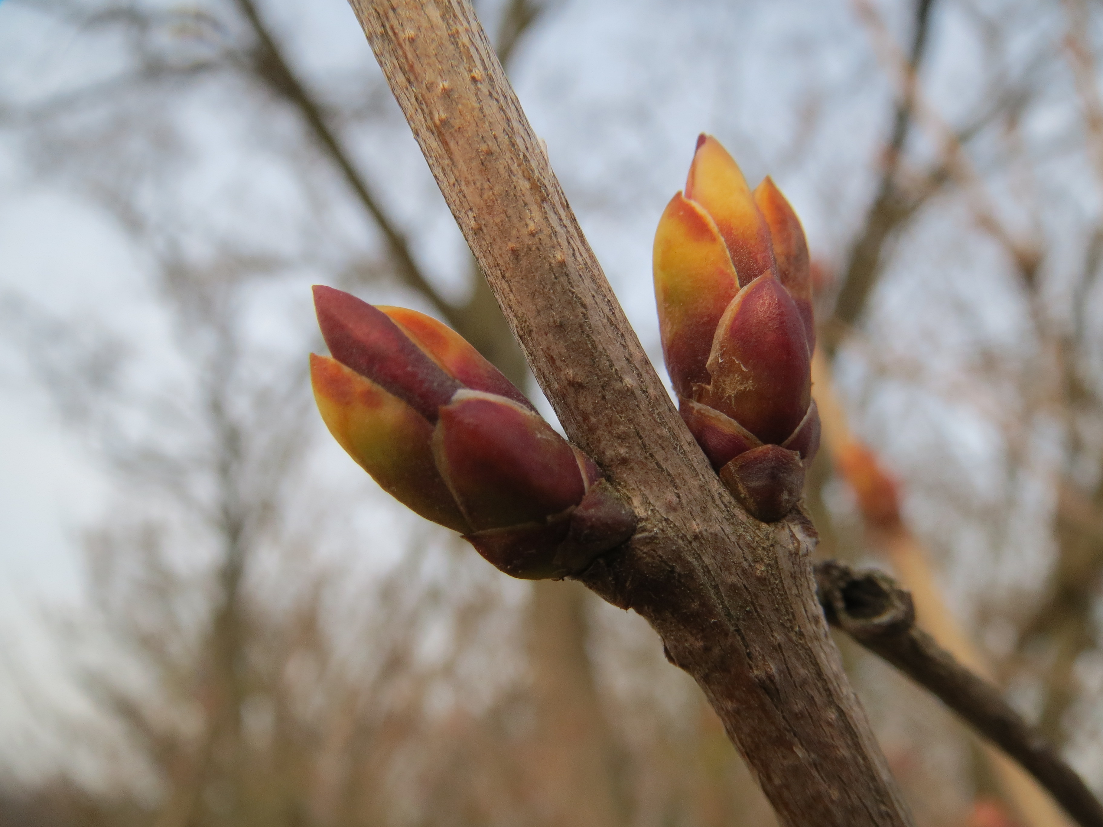 Flieder (Syringa vulgaris) bei Reilingen